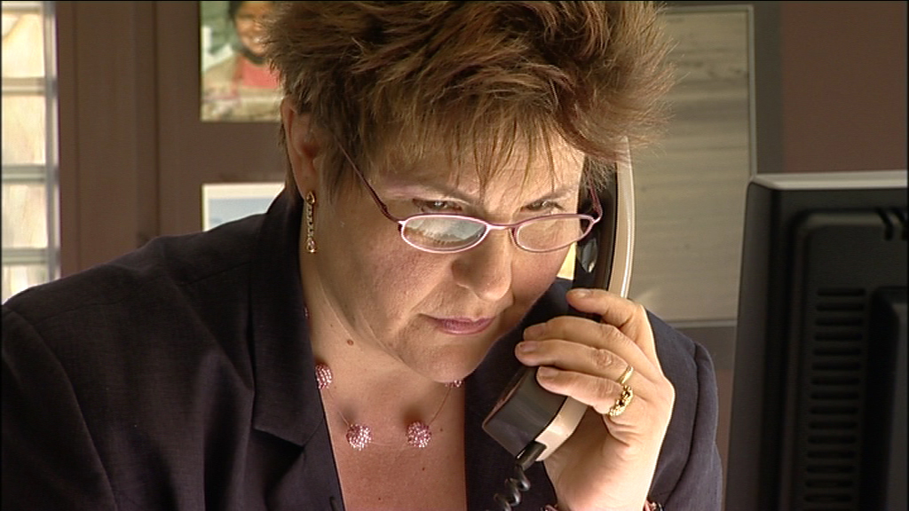 Elisabeth reçoit une demande d’accompagnement au secrétariat d’Exit. Image tirée du film « EXIT, le droit de mourir » de Fernand Melgar.